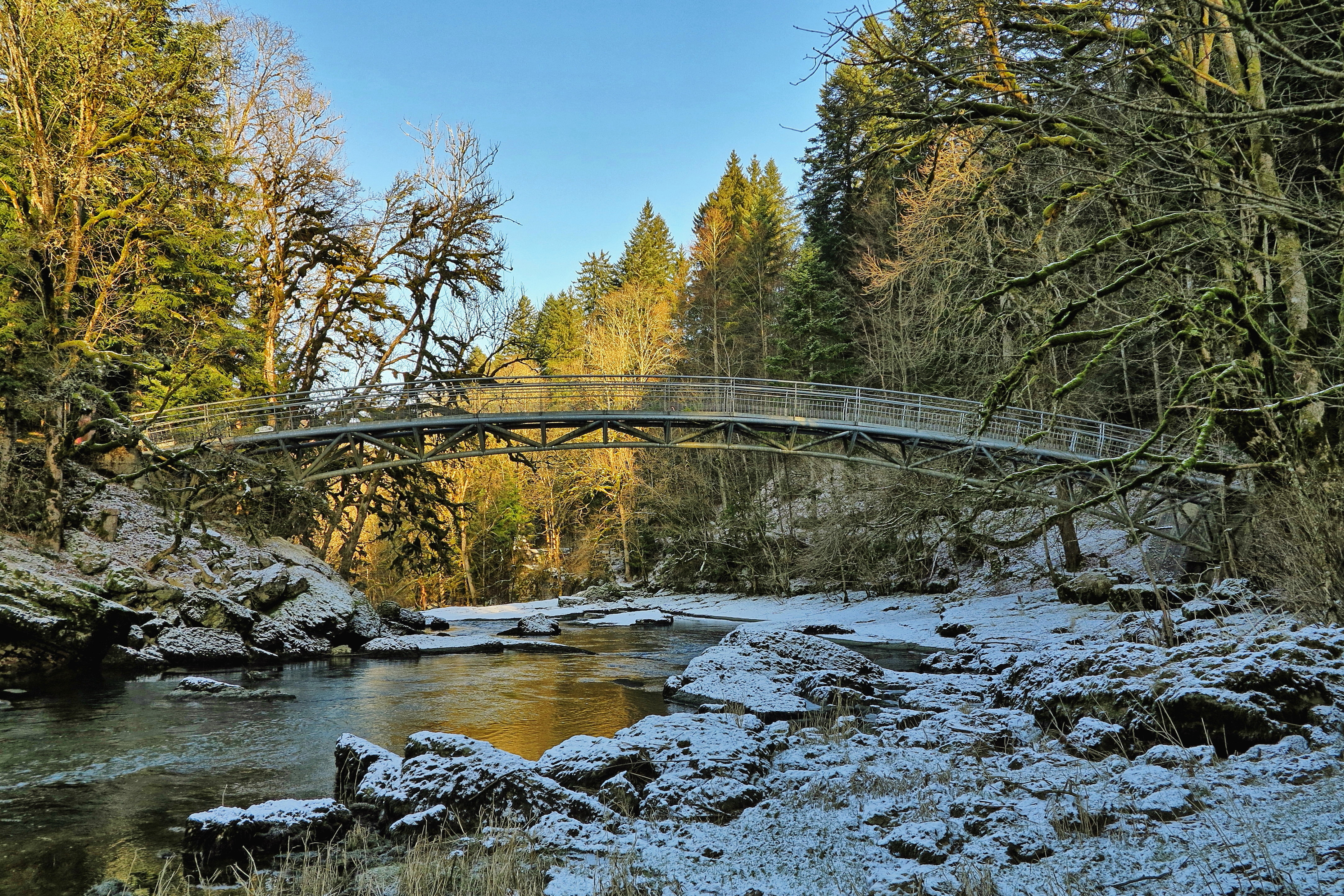 La passerelle franco-suisse sur le Doubs en amont du saut